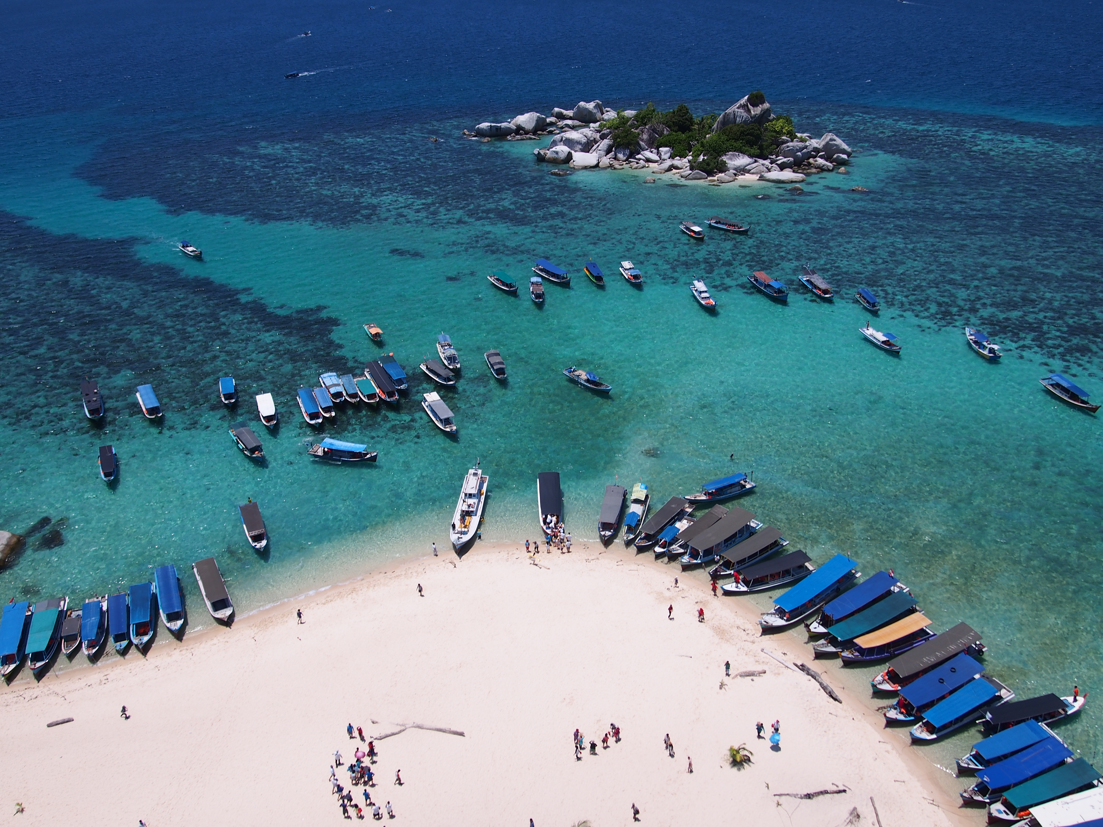 Pulau Belitung telah menjadi pilihan wisata yang menarik selama beberapa tahun terakhir. Selain lokasinya yang dekat dengan Jakarta, Belitung juga memiliki pantai-pantai indah dengan air biru nan jernih. Saat libur akhir minggu, terutama long weekend, Belitung akan dipenuhi wisatawan dari berbagai daerah. Tampak dalam foto, kapal-kapal memenuhi pantai Pulau Lengkuas untuk menaikturunkan penumpang. Di Pulau Lengkuas terdapat mercusuar yang dibangun tahun 1882.